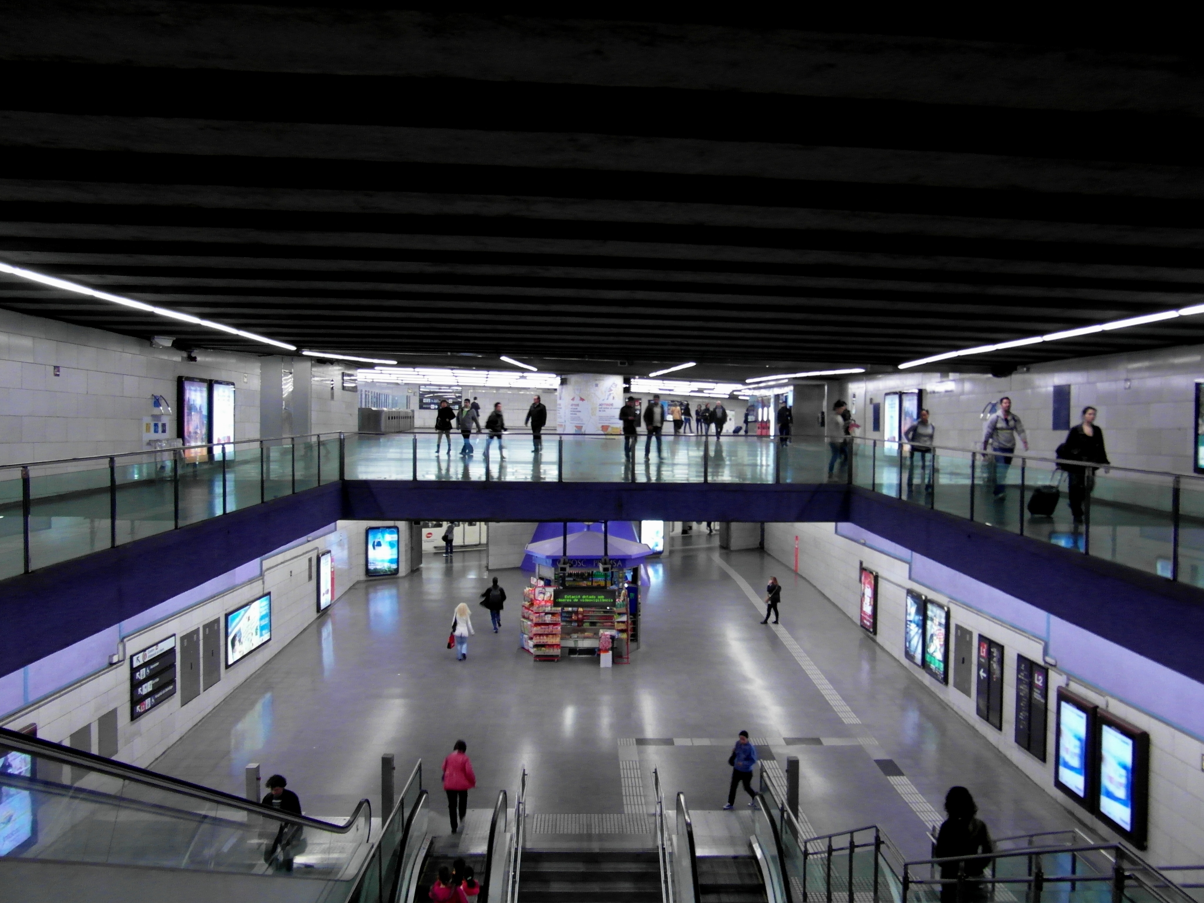 Barcelona - Estació d'Universitat